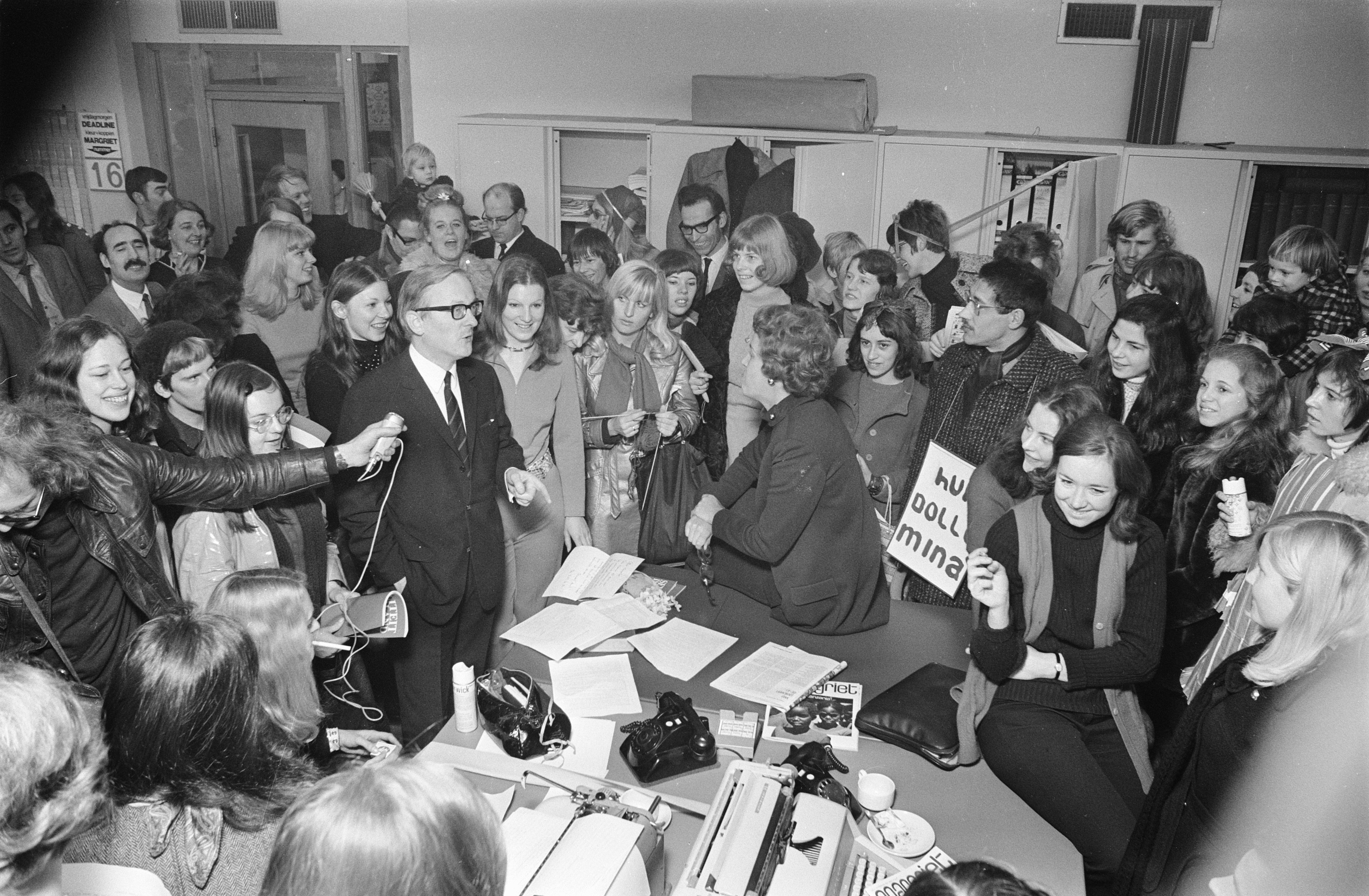 Collectie / Archief : Fotocollectie Anefo Reportage / Serie : [ onbekend ] Beschrijving : Actiegroep 'Dolle Mina' in de redactielokalen van het damesblad Margriet De Dolle Mina's zijn in discussie met directeur Te Marvelde en adjunct hoofdredacteur mevrouw Van den Horst Datum : 20 februari 1970 Locatie : Amsterdam, Noord-Holland Trefwoorden : actiegroepen, damesbladen, discussies Persoonsnaam : Margriet, prinses, Mevrouw van den Horst Instellingsnaam : Dolle Mina Fotograaf : Verhoeff, Bert / Anefo Auteursrechthebbende : Nationaal Archief Materiaalsoort : Negatief (zwart/wit) Nummer archiefinventaris : bekijk toegang 2.24.01.05 Bestanddeelnummer : 923-2727